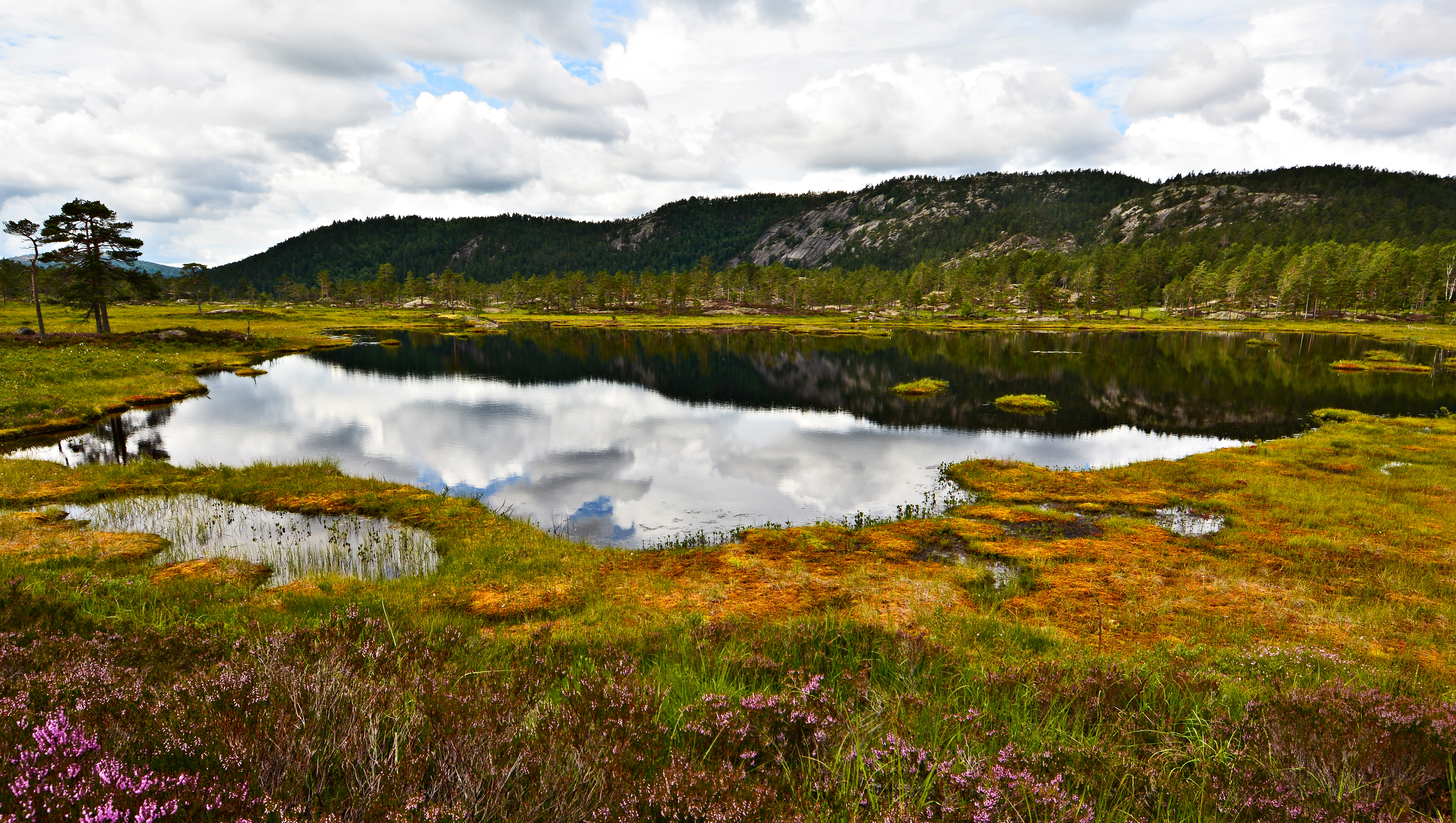 Krokevatn i Hovassdalen naturreservat i Hovassdalen i Evje og Hornnes kommune i Aust-Agder.